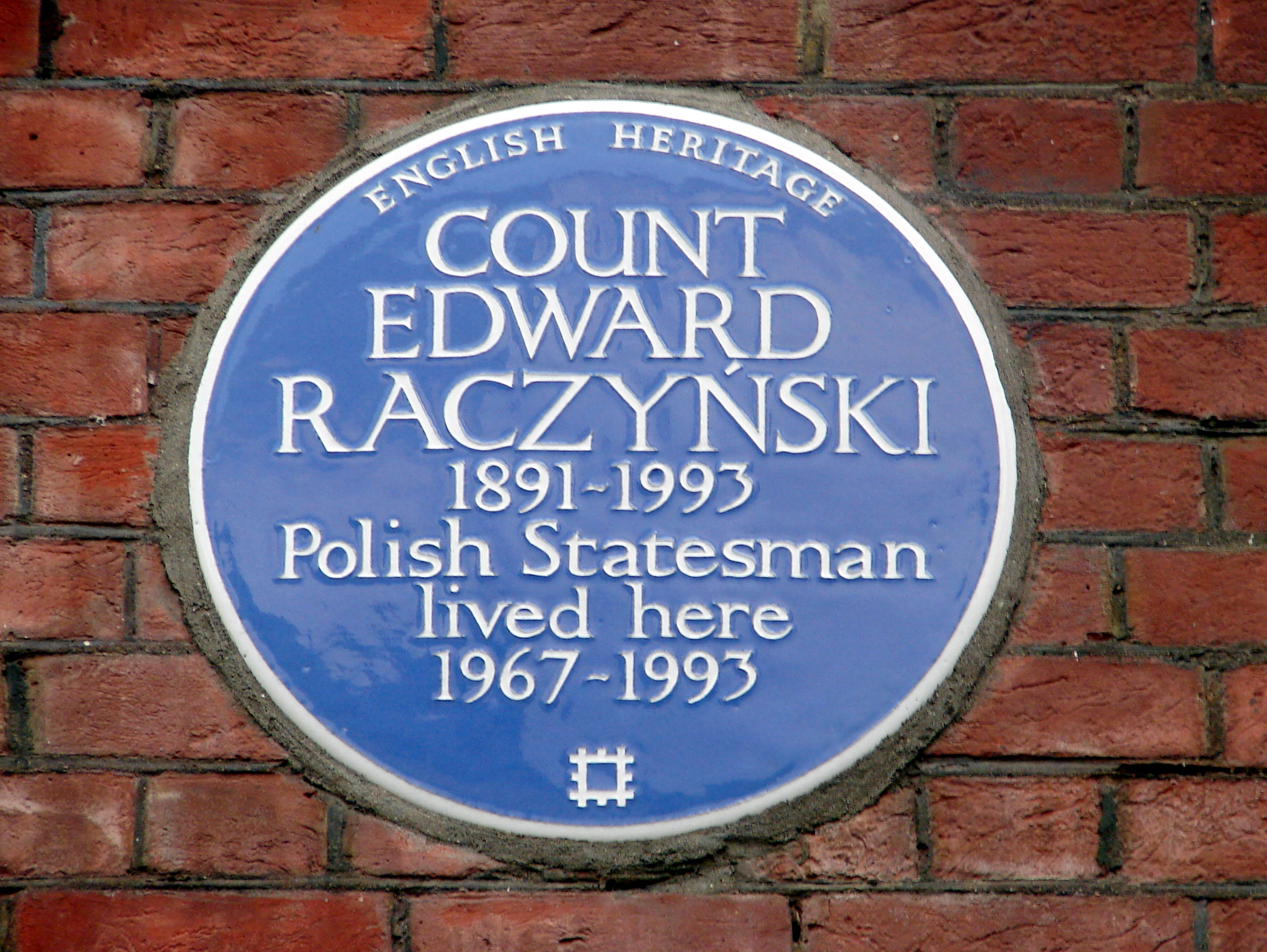 Count Edward Raczynski